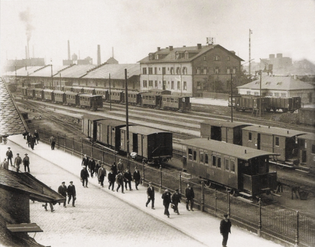 Betriebshof Ludwigshafen-Depot der Schmalspurbahnen um 1910